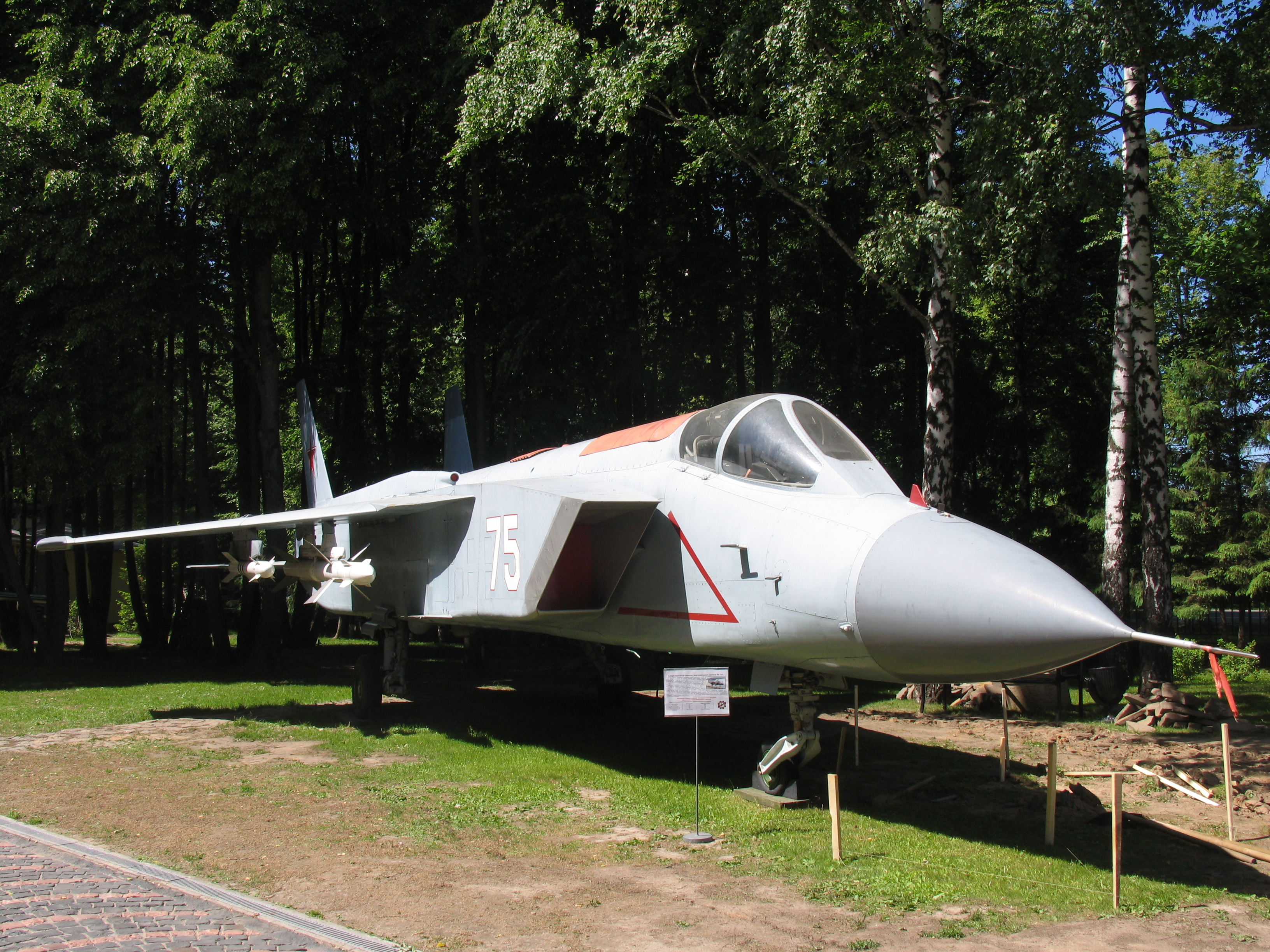 Як-141 в Музее техники Задорожного.